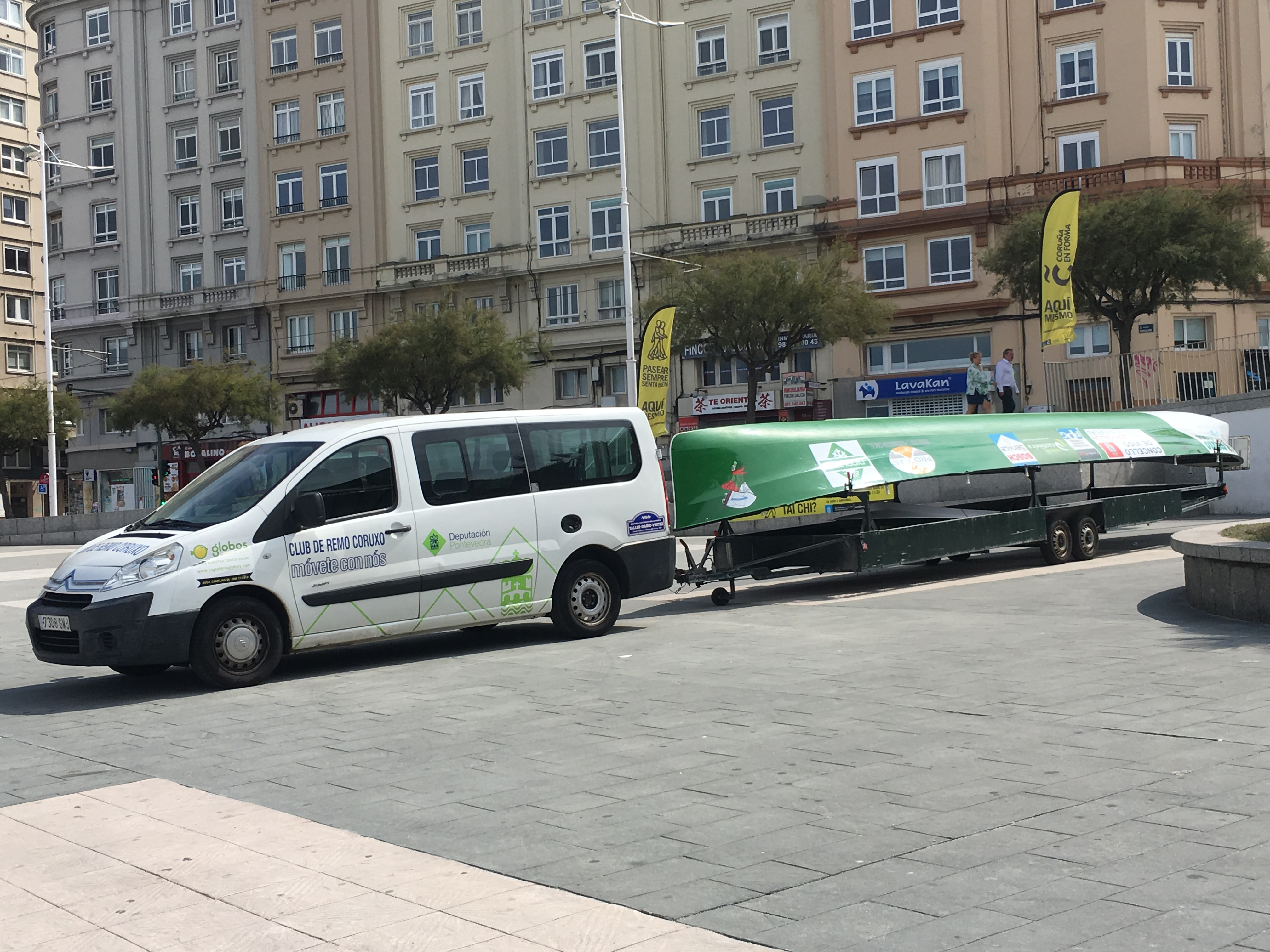 Traiñeira de Coruxo na Bandeira Teresa Herrera da Coruña en 2019.